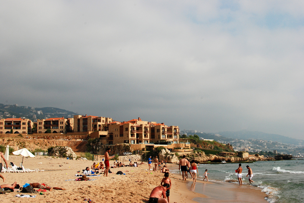 byblos, lebanon.